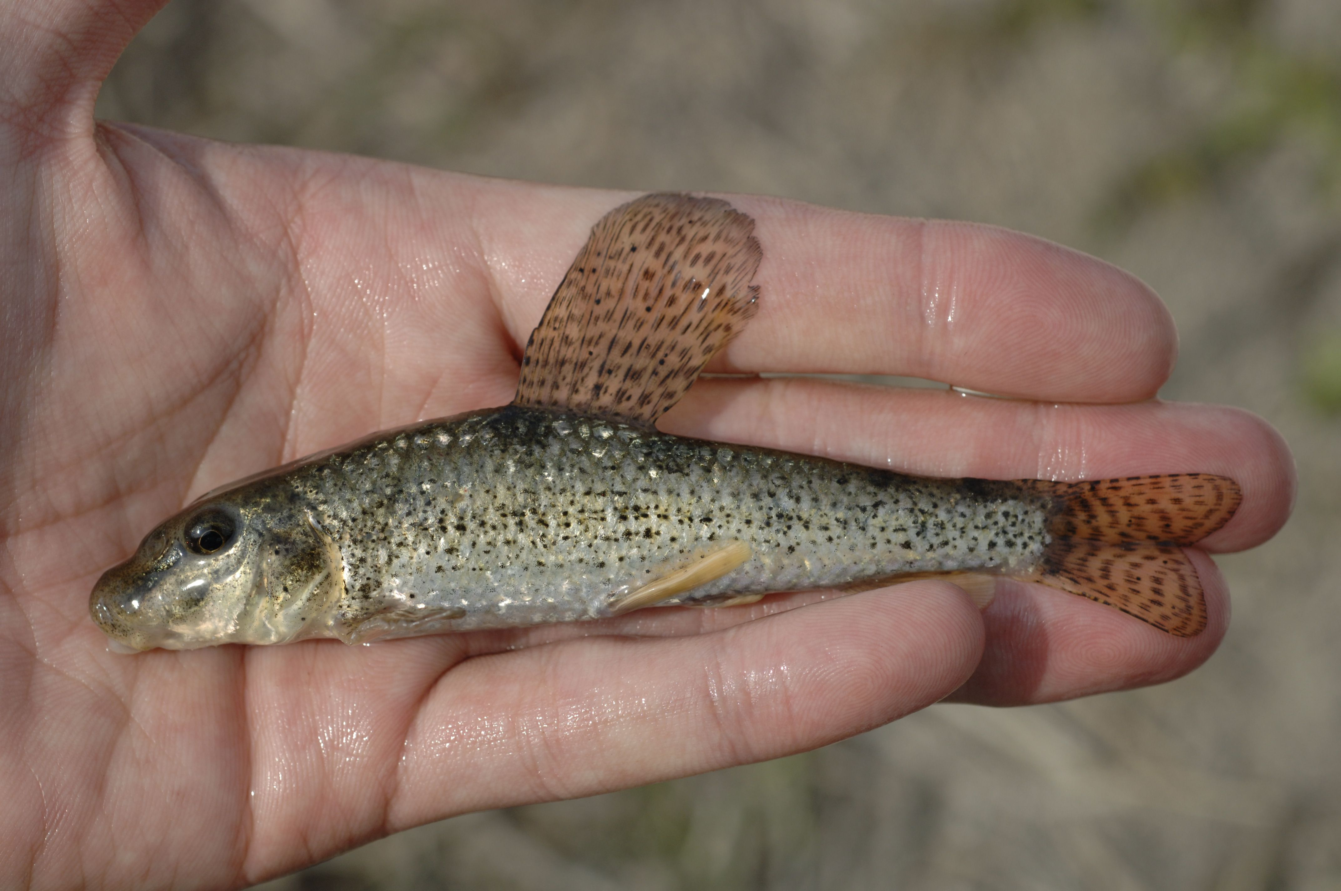 春の繁殖期、背びれの伸長したオスのカマツカ。筑後川水系。詳細